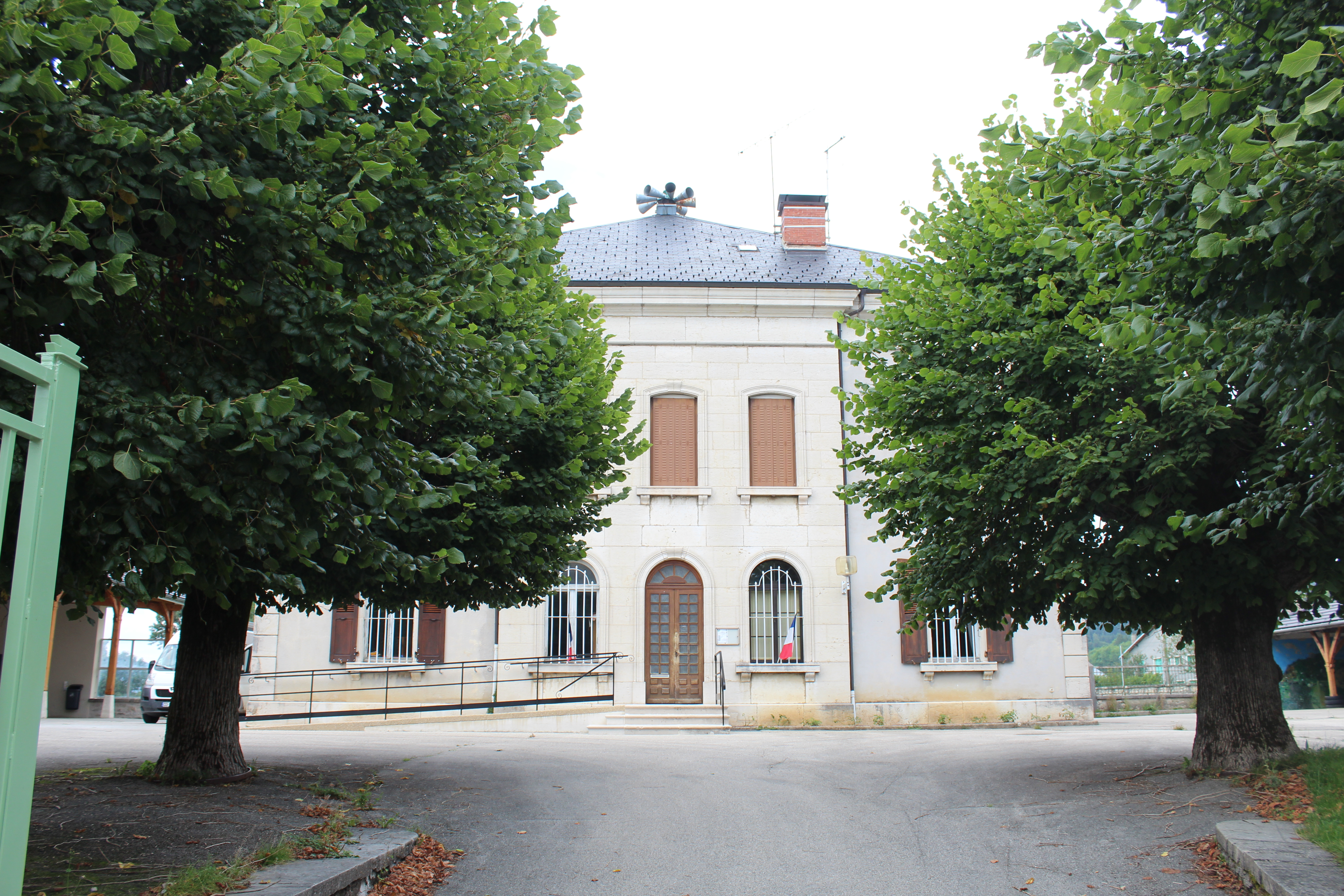 Mairie de Champdor, Champdor-Corcelles.